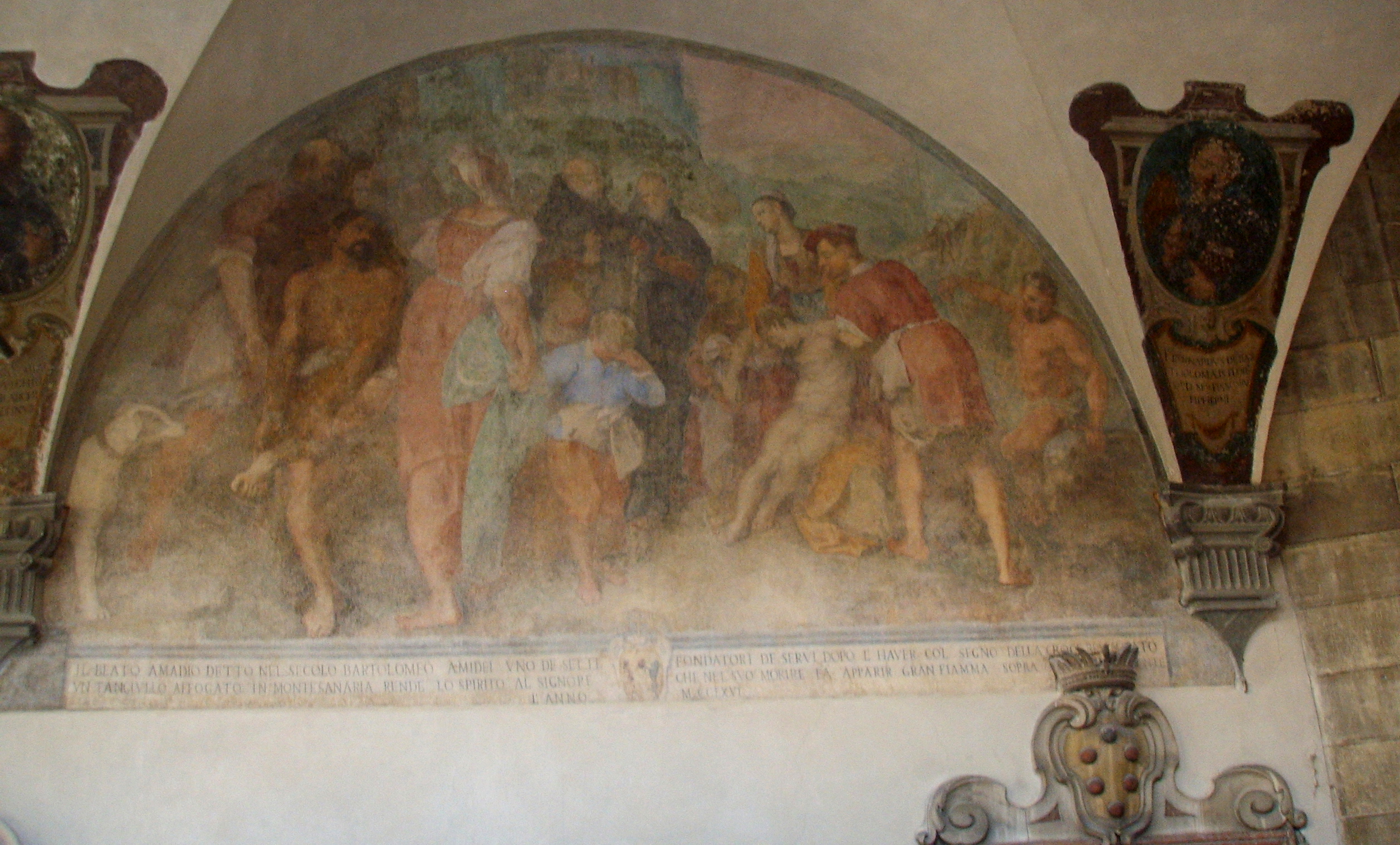 Santissima annunziata chiostro grande bernardino_poccetti,_s.amadio_degli_amidei_risuscita_un_fanciullo_annegato in Florence, italy